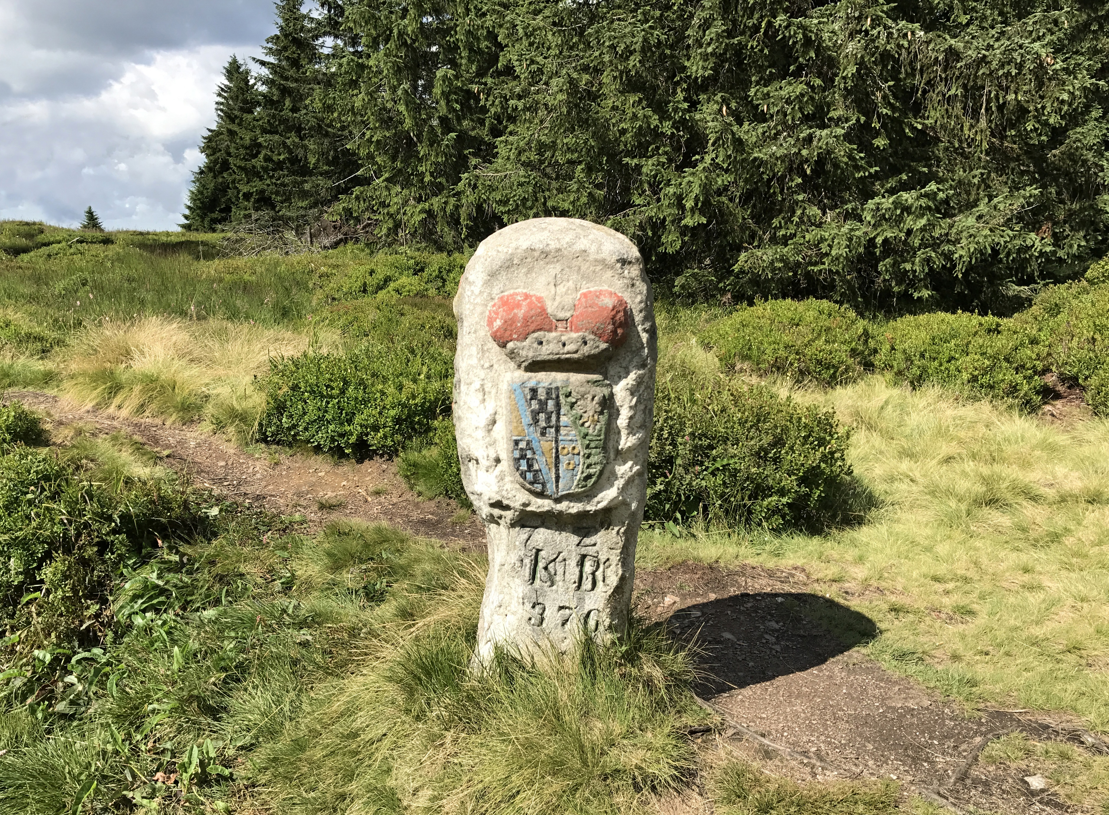 Boží Dar, trojmezní historický hraniční kámen